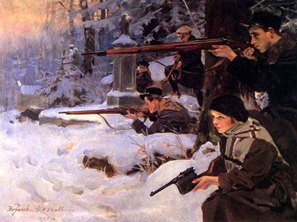 Wojciech Kossak "Orleta - obrona cmentarza" (olej na płótnie 90 x 120 cm, Muzeum Wojska Polskiego w Warszawie).